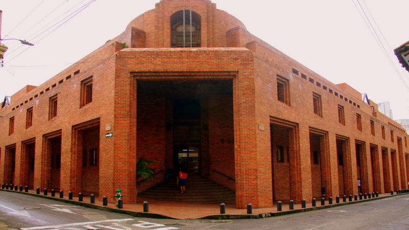 Centro Cultural de Cali SECRETARIA DE CULTURA Y TURISMO Cra. 5 No. 6-05 Tels.:(57)(2) 8858851 al 56. Cali / COLOMBIA Foto Gonzalo Gonzalez